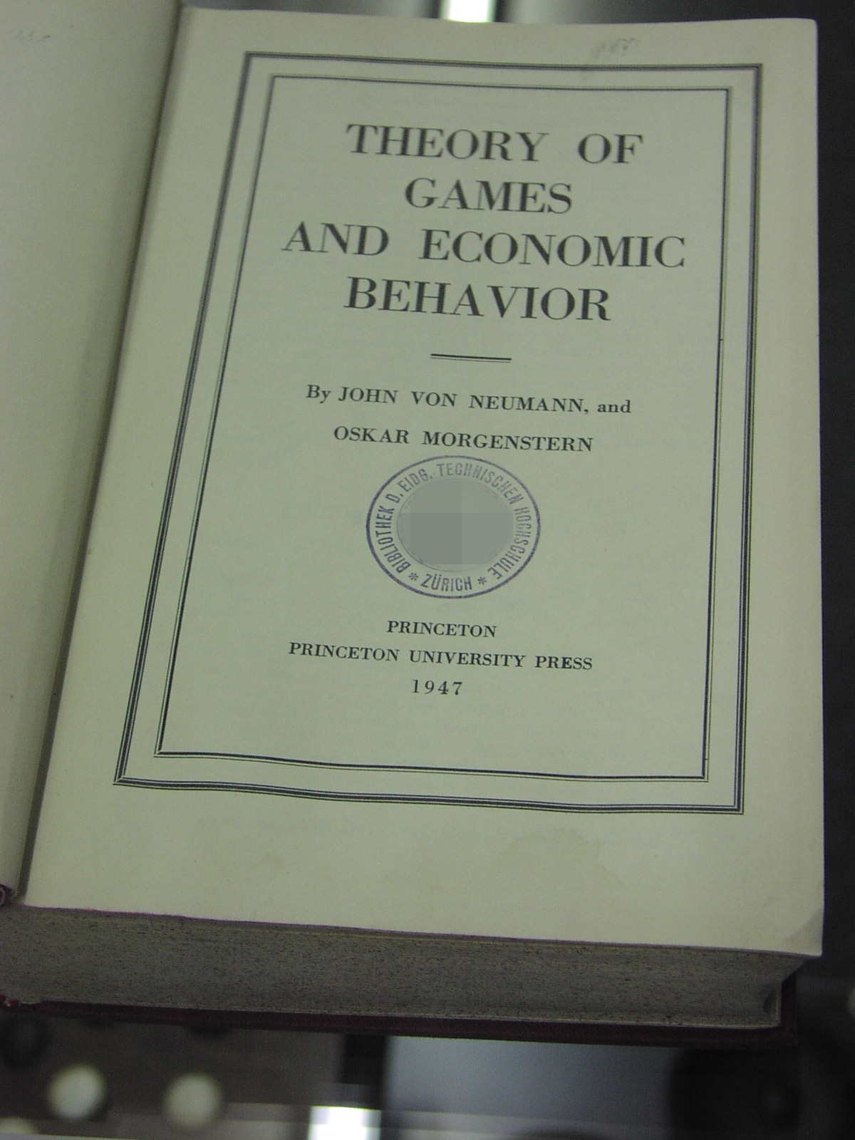 Neumann és Mergenstern könyvének egy példánya az Eidgenössische Technische Hochschule könyvtárában